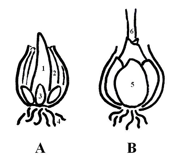 Een schematische tekening van een bloembol in het vroege voorjaar (A) en tijdens de bloei (B). Aangegeven zijn: 1 eindknop, 2 rok, 3 knop, 4 wortels, 5 nieuwe bol, 6 stengel.